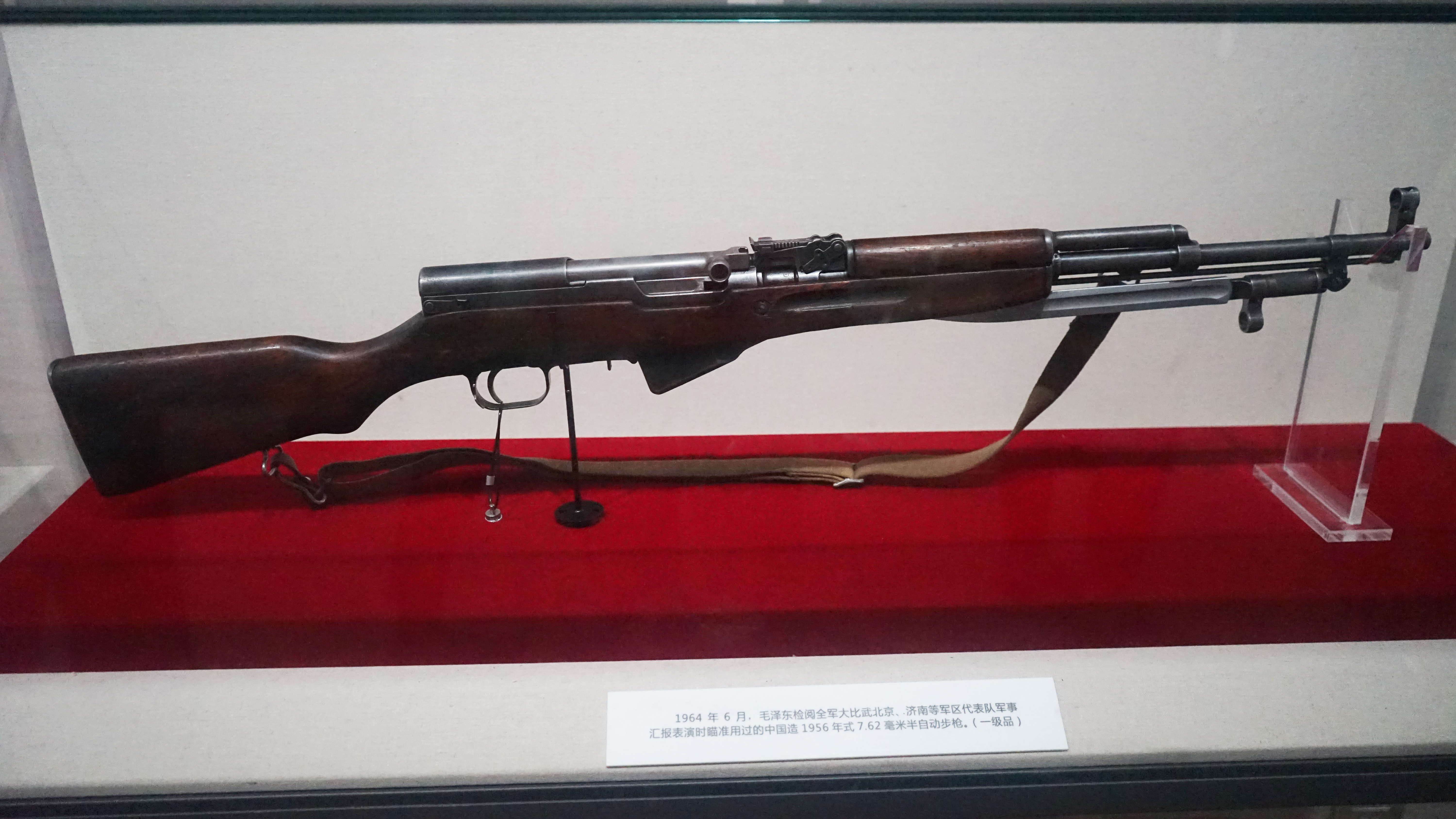 1946年6月毛泽东检阅全军大比武北京、济南等军区代表队军事汇报表演时用过的中国造1956年式7.62mm半自动步枪。一级文物